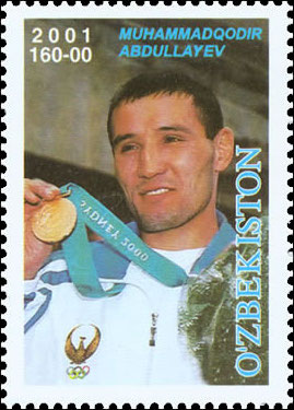 Muhammad Abdullaev